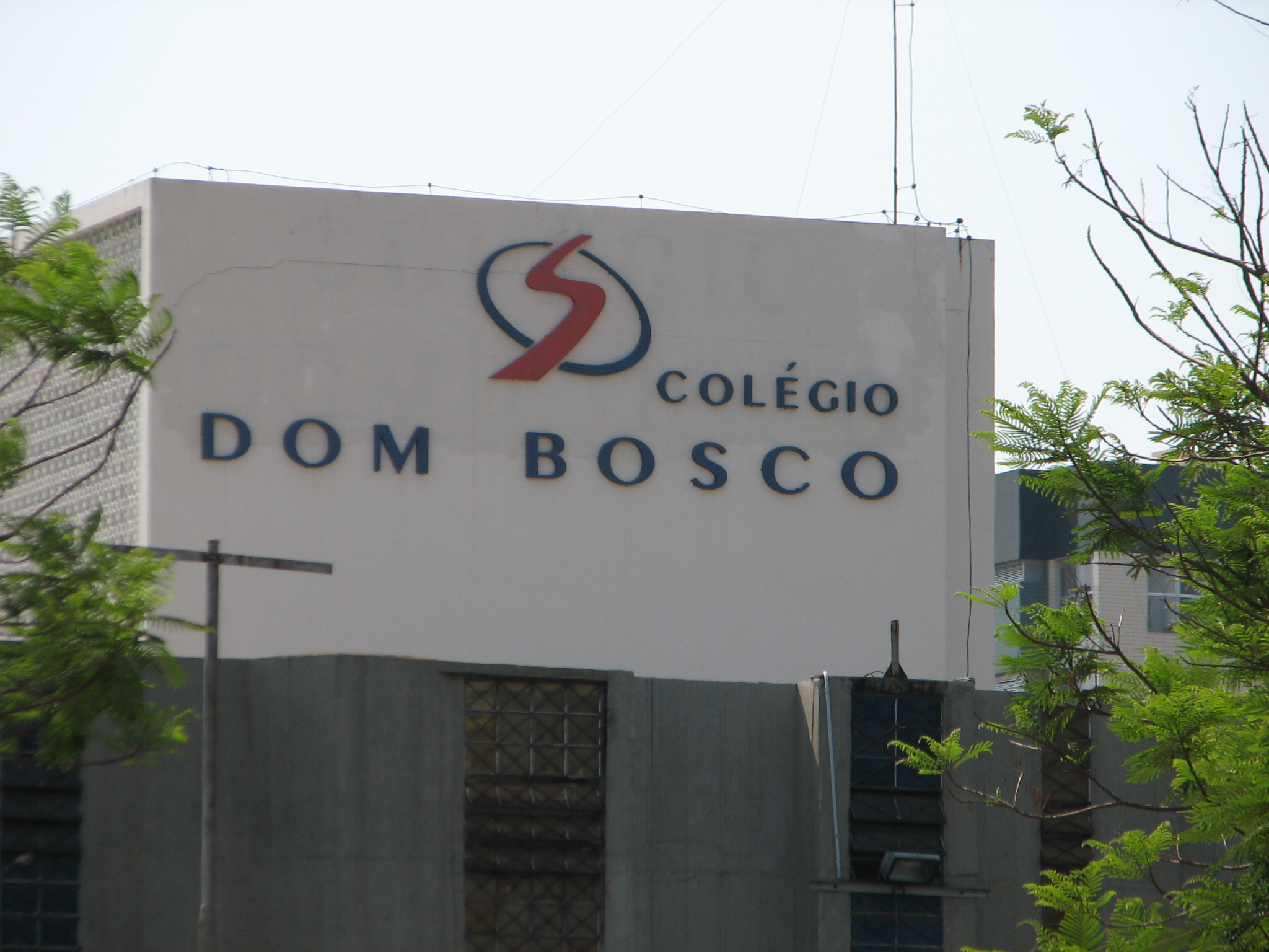 Colégio Dom Bosco, Brasília, Brazil